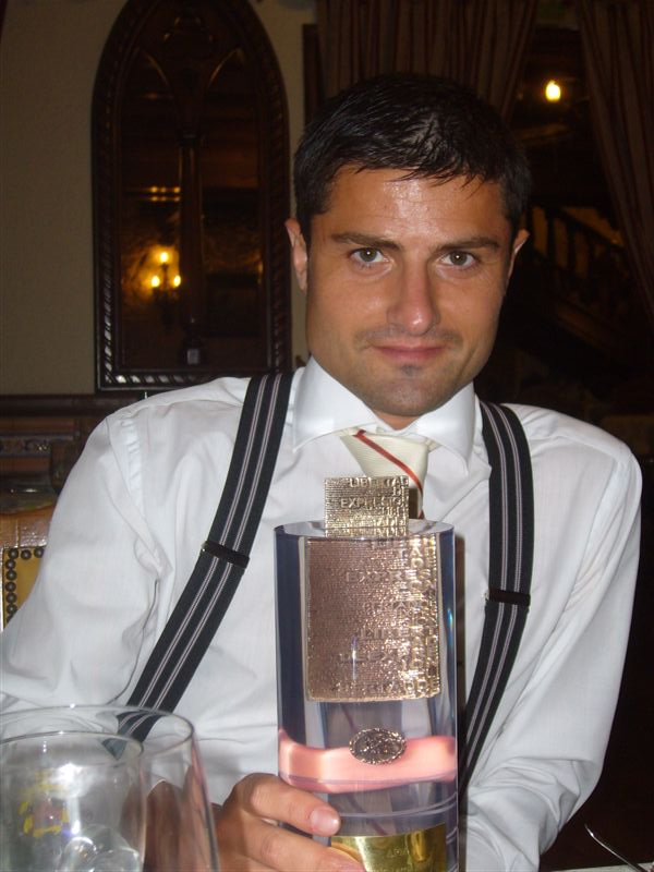 Premio Mariano José de Larra en 2010 al periodista menor de 30 años que más se ha distinguido durante el año anterior, otorgado por la Asociación de la Prensa de Madrid.